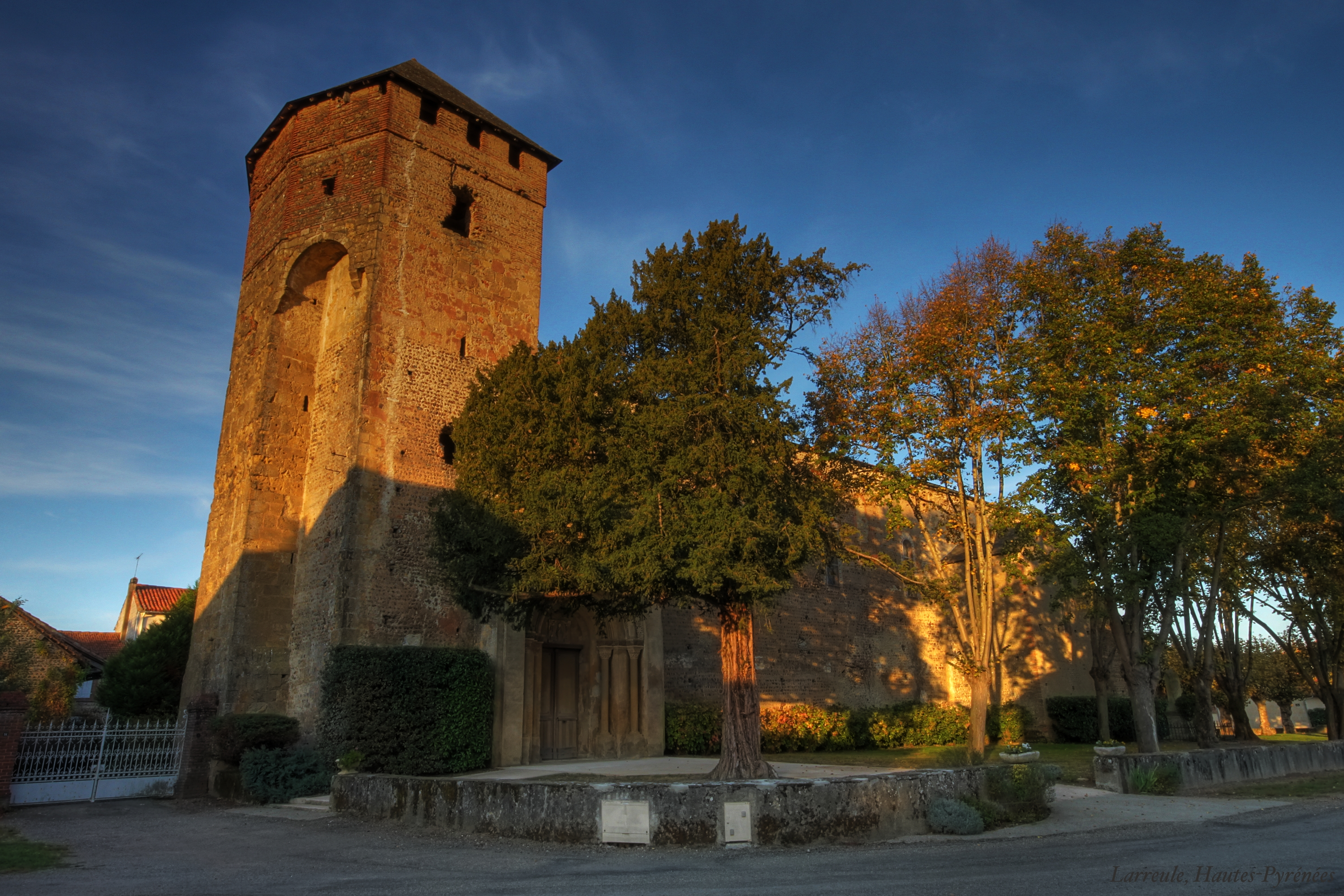 Église, 65262 Larreule